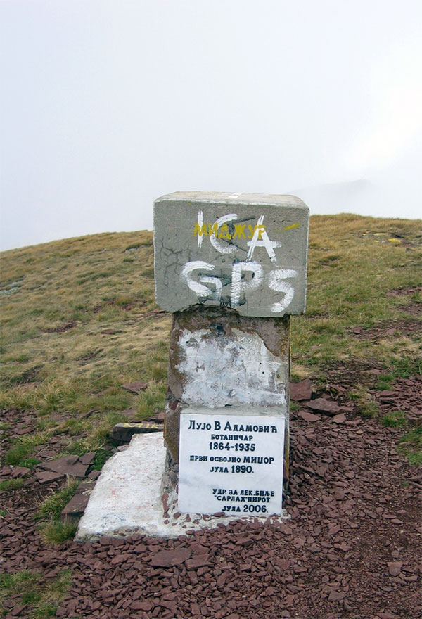 Stara planina - Midzor